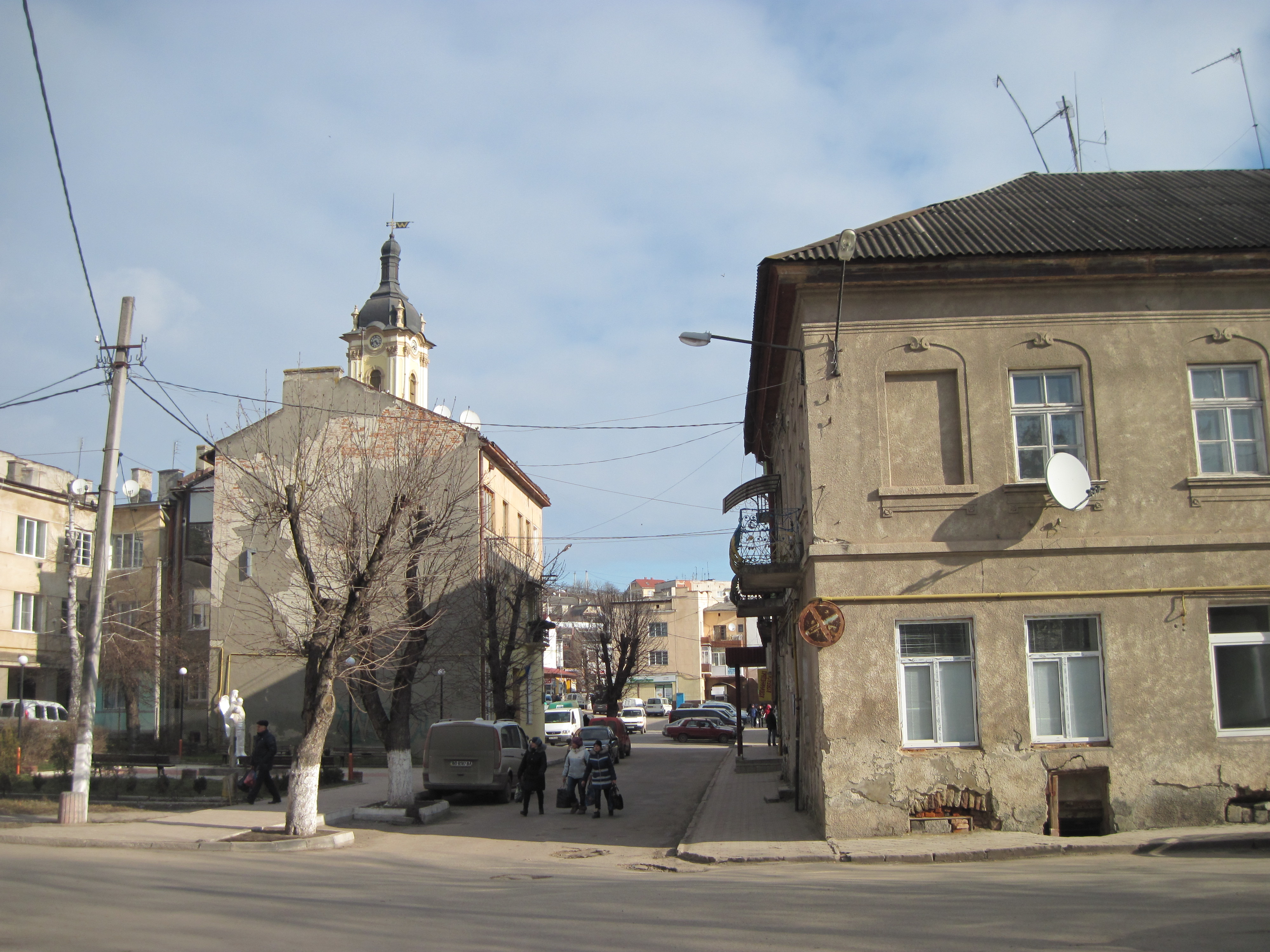 Перехрестя вулиць Аґнона і Мулярської в м. Бучачі Тернопільської області, Україна.